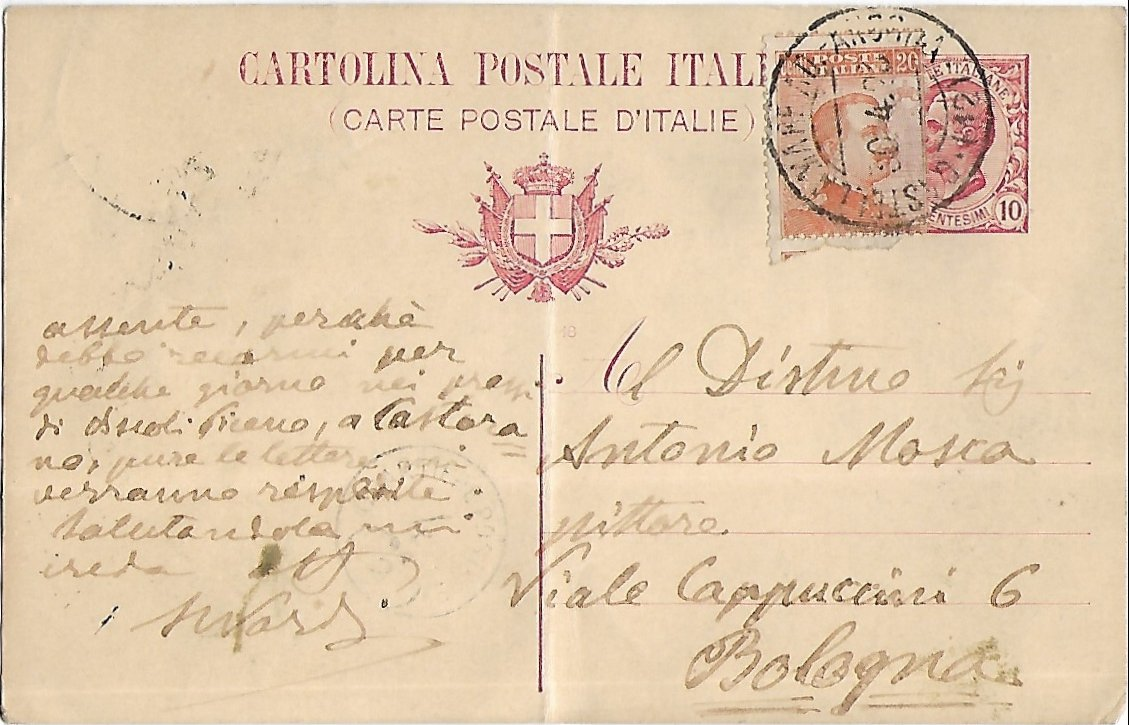 Cartolina postale spedita da Porto San Giorgio il 29 aprile 1923 da Sigismondo Nardi al pittore Antonio Mosca via dei Cappuccini, 6 Bologna per prendere accordi per i lavori di restauro e decorazione della parrocchia di Borgo Valsugana